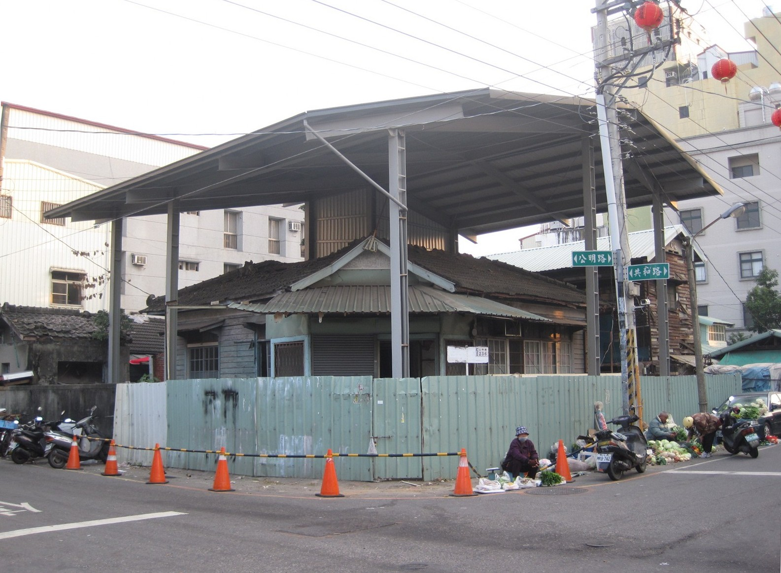 原嘉義東門派出所